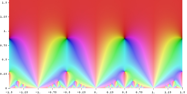 Eisenstein series G_4